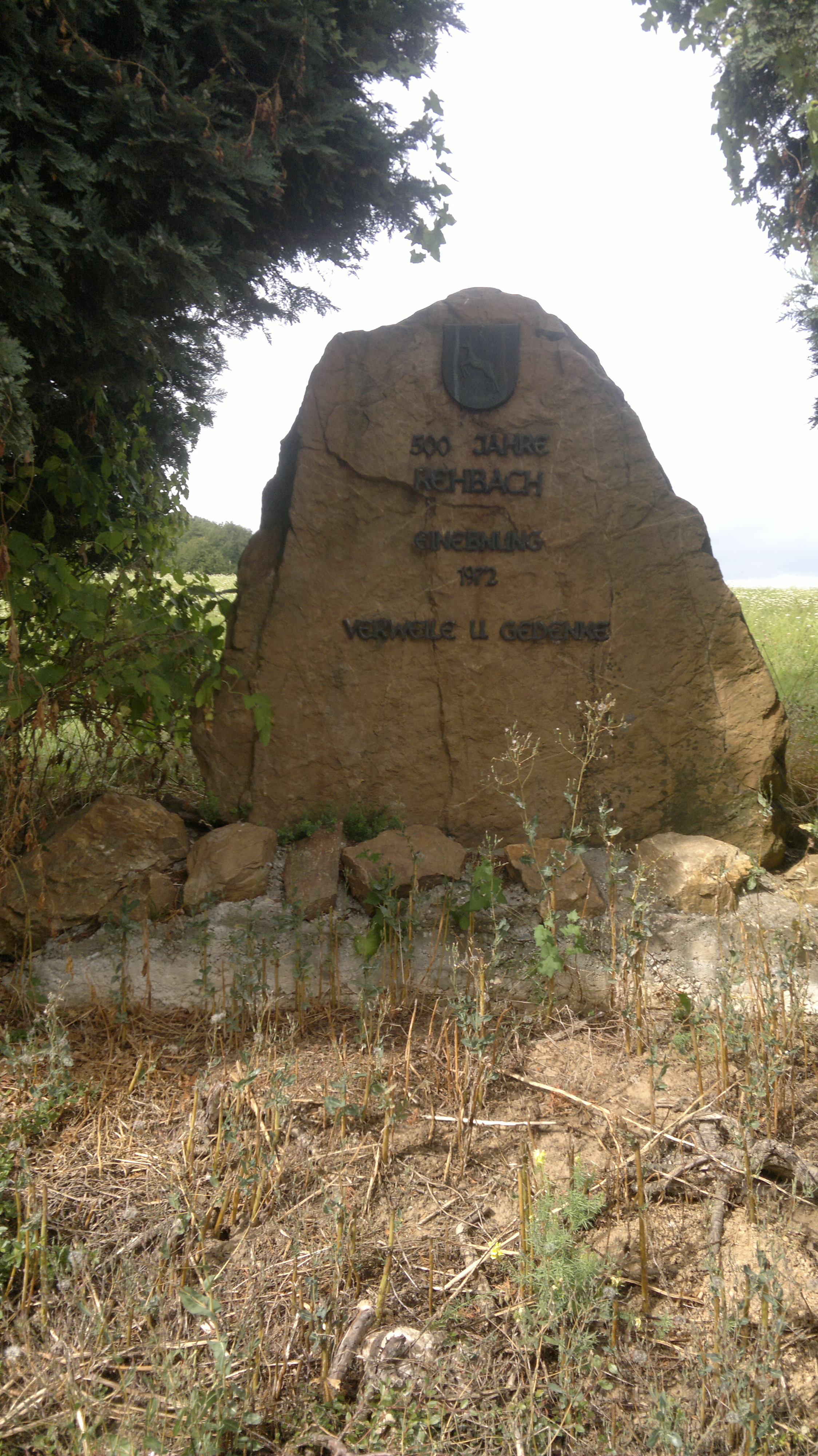 Gedenkstein an ehemalige Ortslage Rehbach bei Bad Sobernheim. Einebnung 1972 wegen Fluglärm und Gefahr von Flugzeugabstürzen, da in der Einflugsschneise zum ehem. NATO-Flugplatz Pferdsfeld